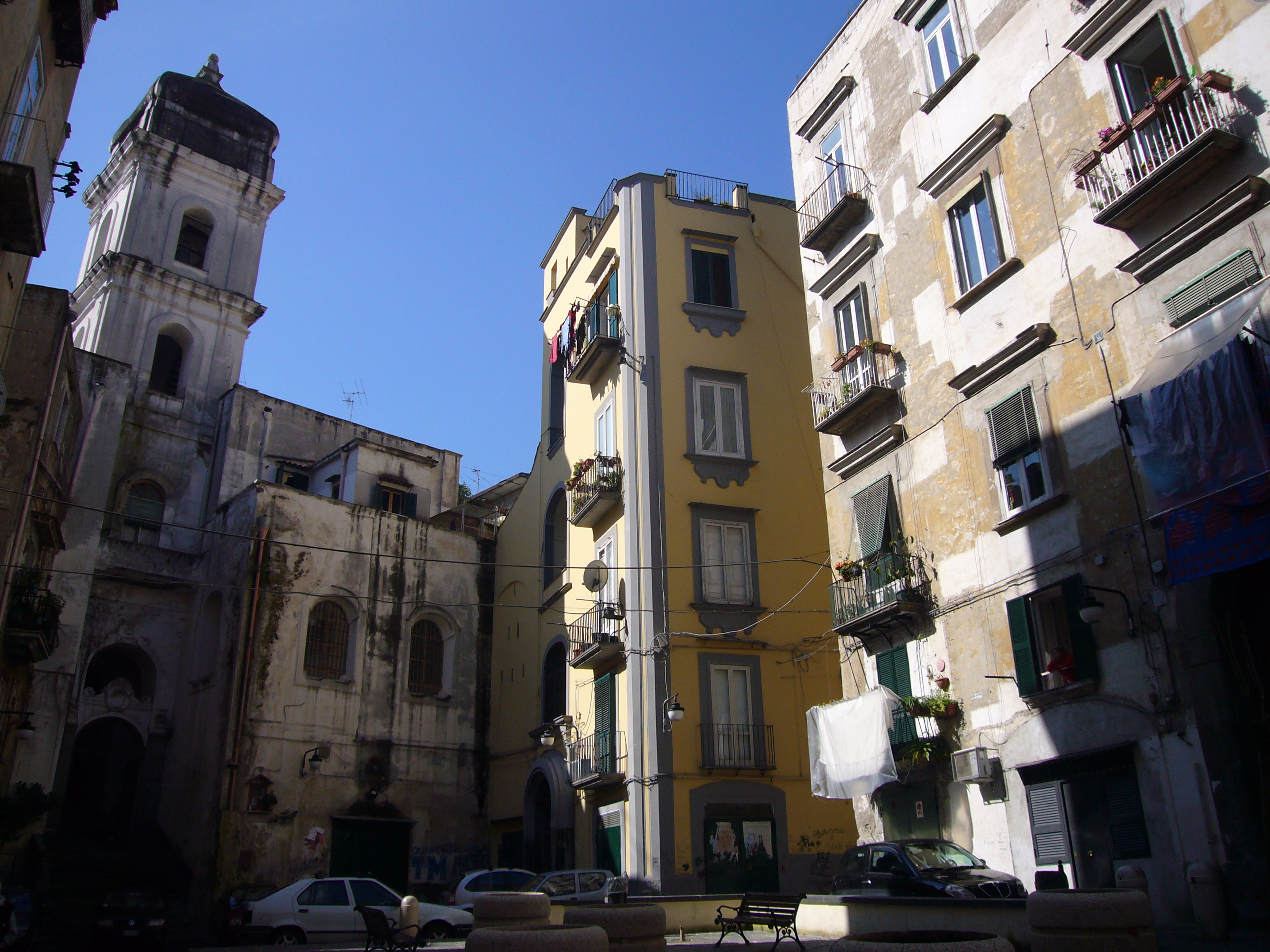 Napoli, Sant'Anna di Palazzo: campanile dalla piazzetta Rosario di Plazzo